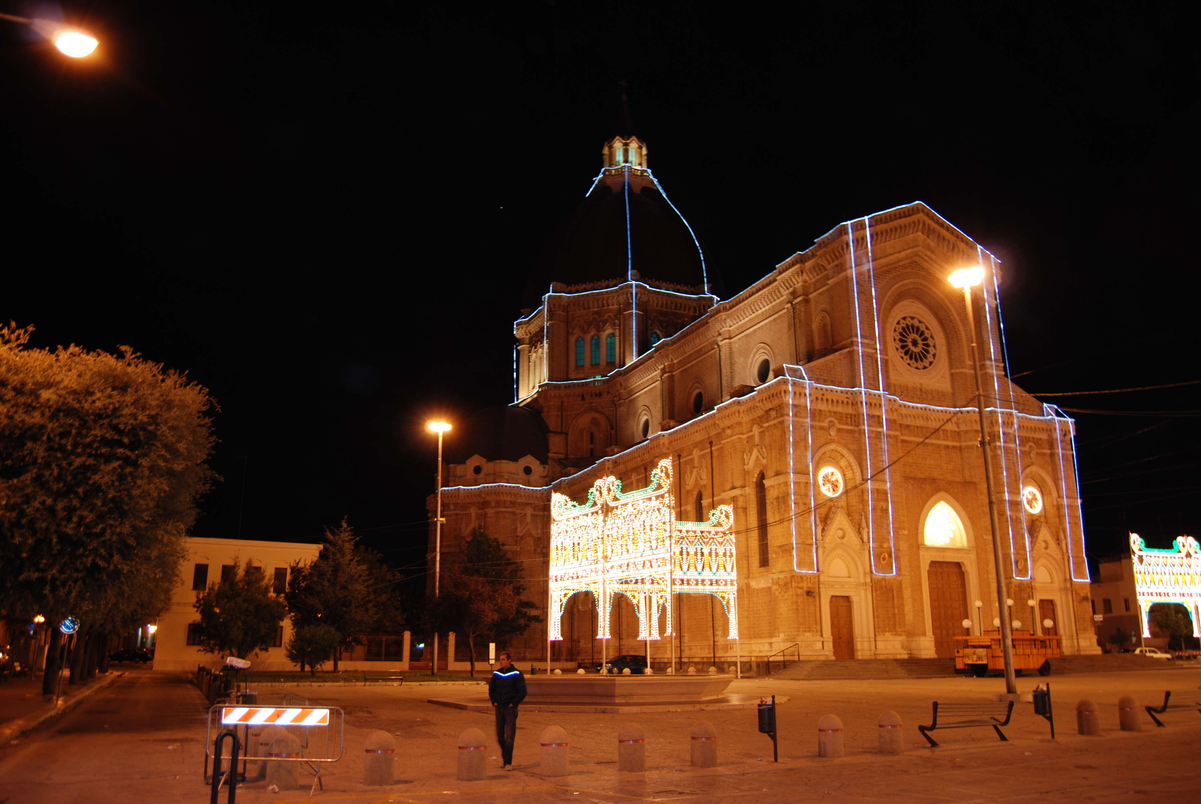 duomo